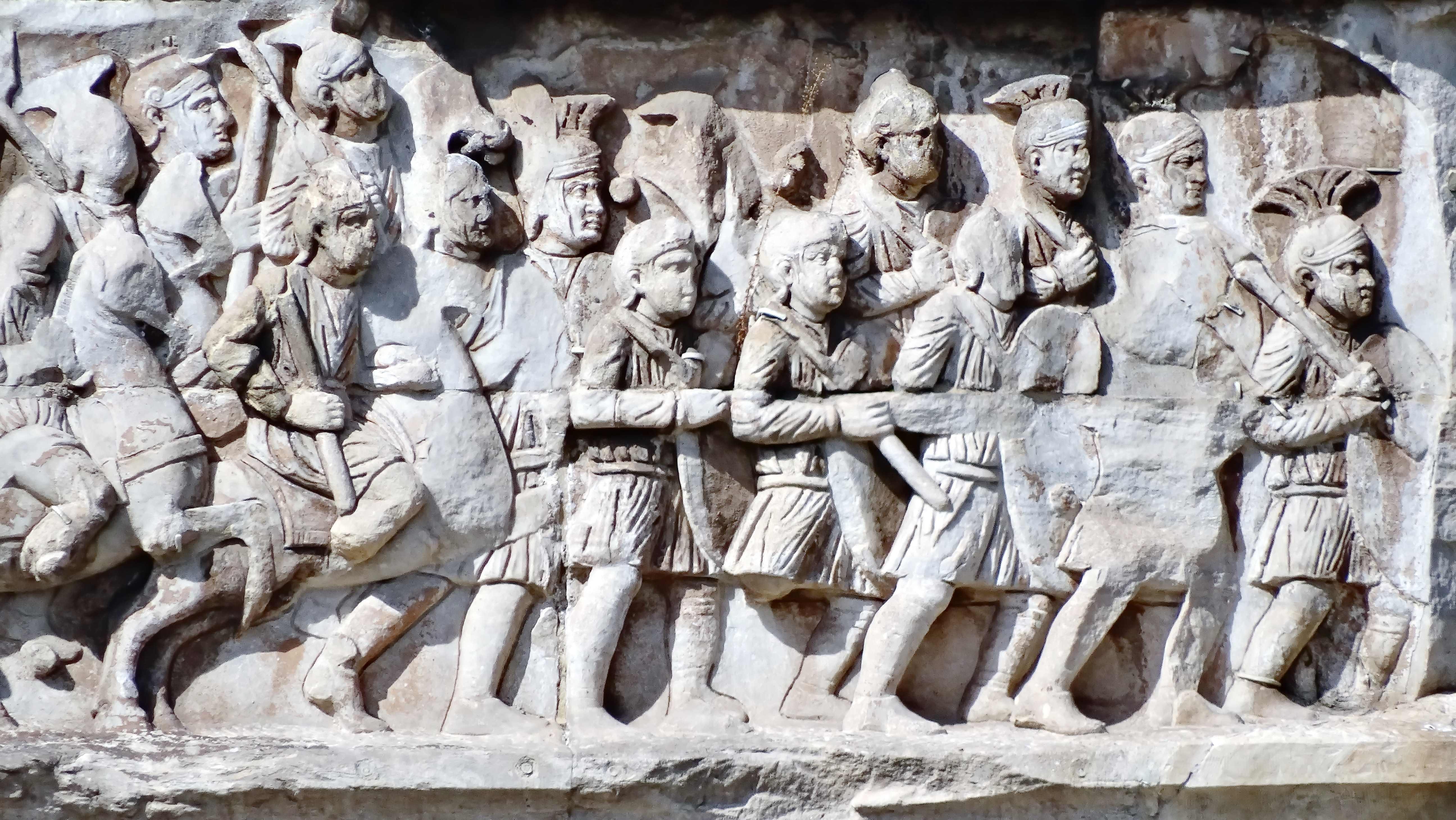 Arco di Costantino, ricostruzione del 315 d.c. su precedente arco dell'epoca di Adriano. Fregio Costantiniano 315 d.c.